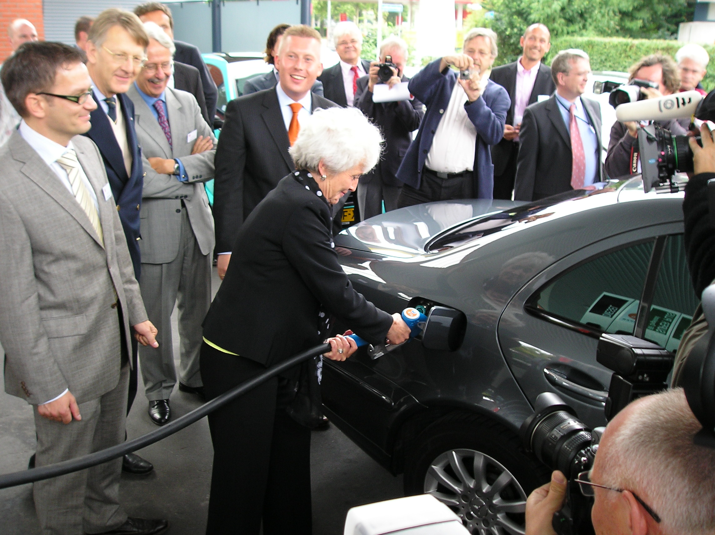 hE15 sinds 7 juli te verkrijgen in onder meer Voorburg, geopend door J.Cramer